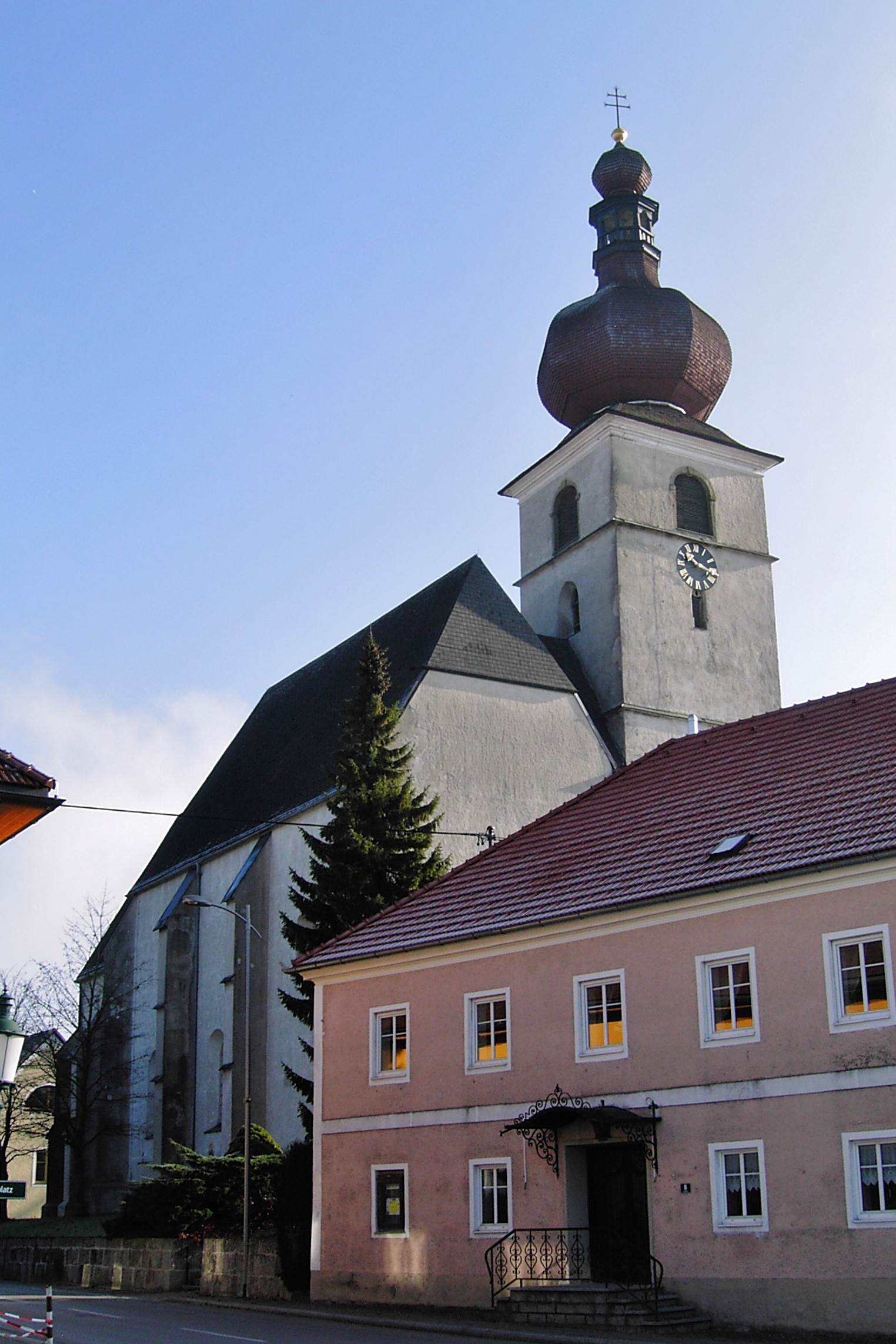 Waldneukirchen Kath.Pfarrkirche Hll.Peter und Paul, Dorfplatz